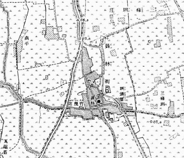 員林街在日本台灣堡圖。